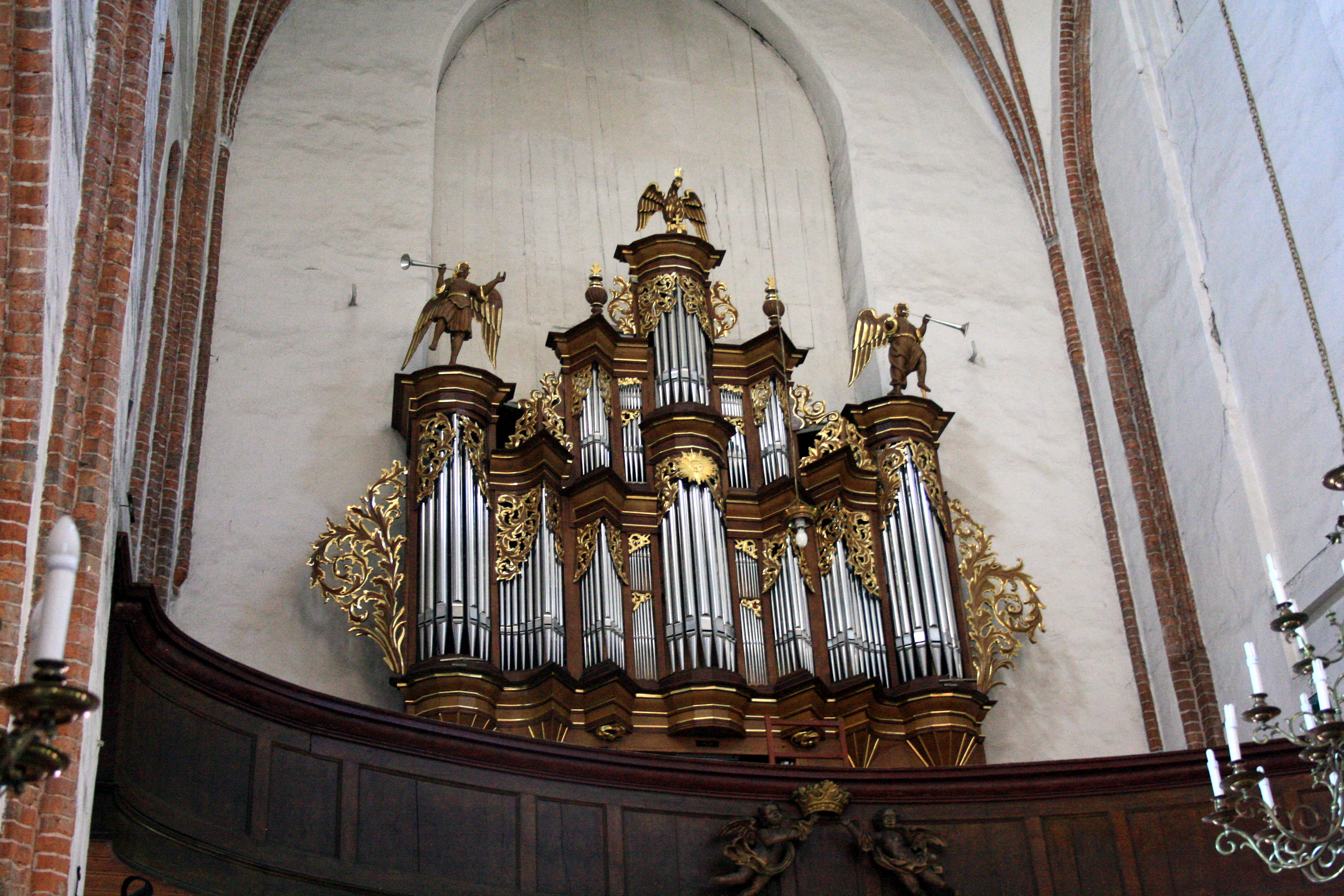 Kościół Matki Bożej Częstochowskiej - chór